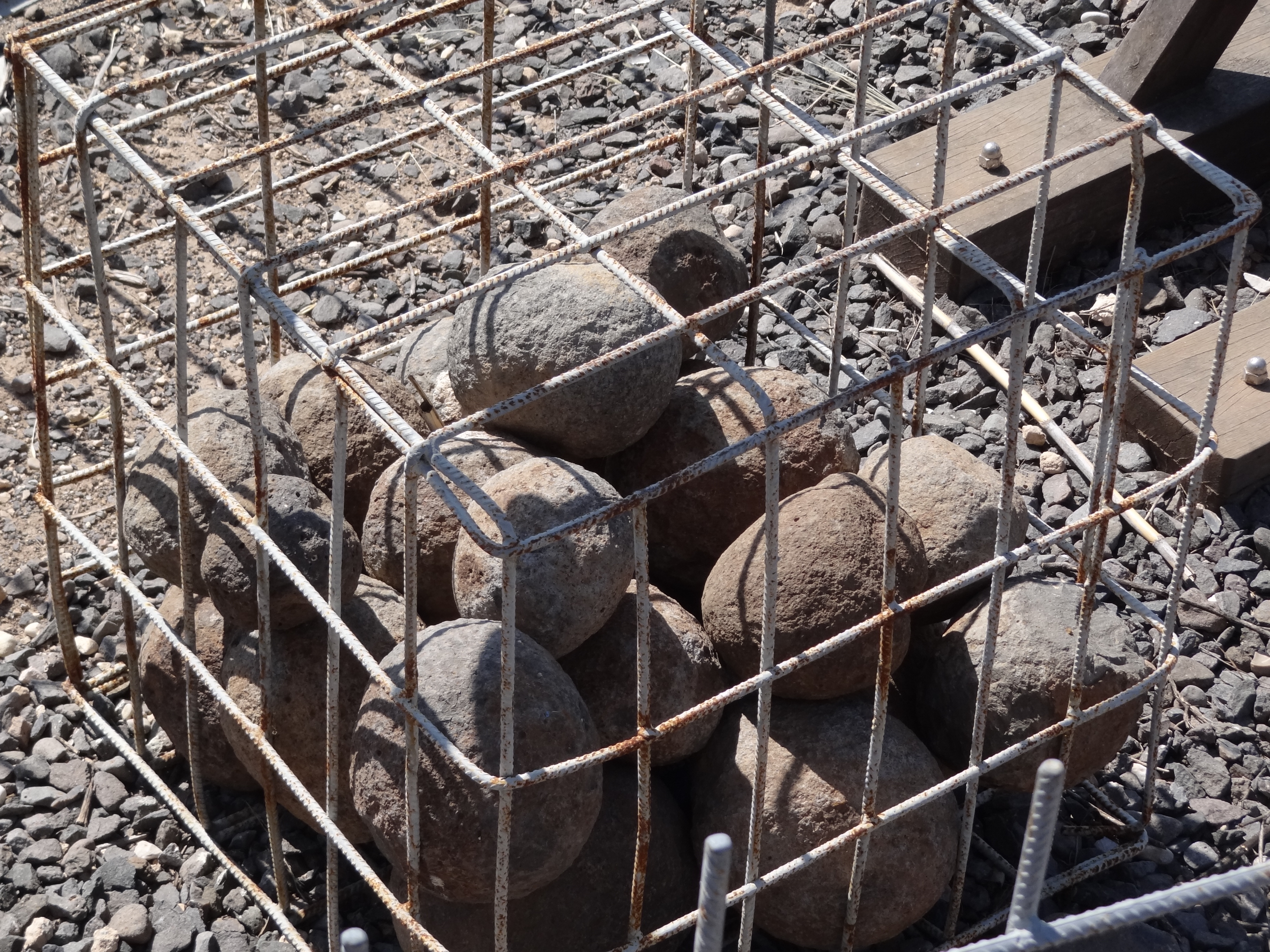 Gamla archaeology site אתר ארכאולוגי גמלא ברמת הגולן אבני בליסטרה שנמצאו באתר